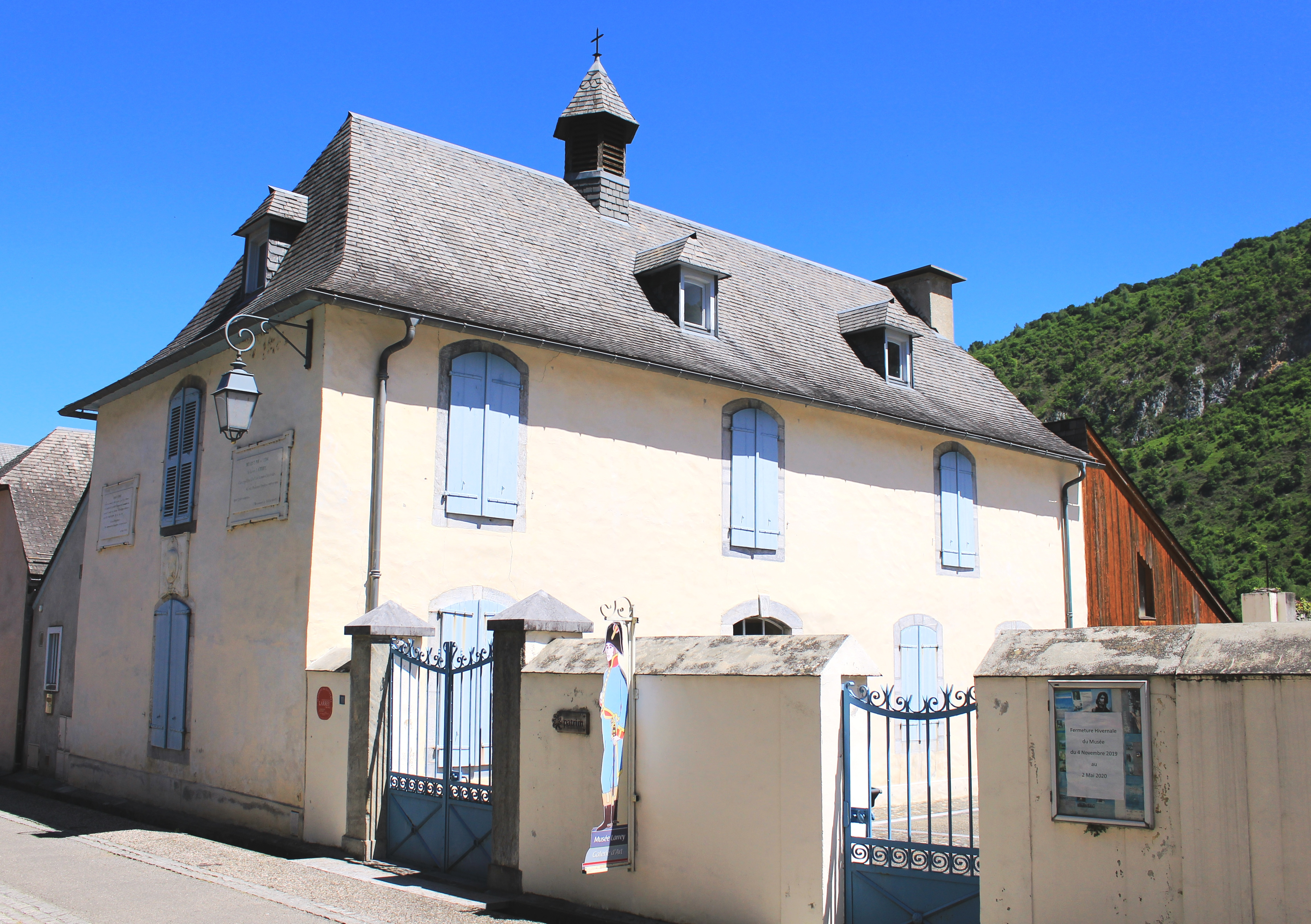 Musée de Beaudéan (Hautes-Pyrénées)